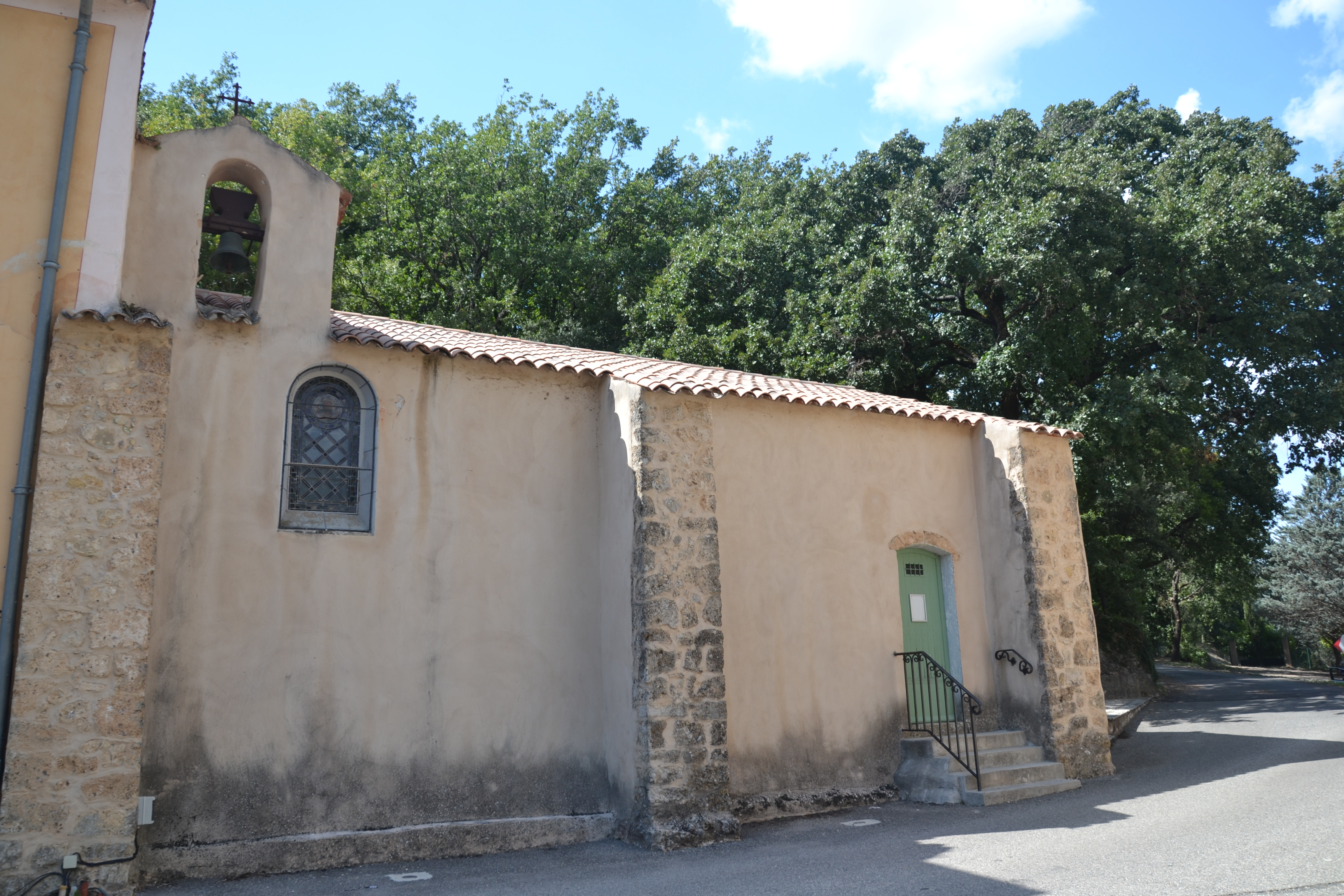 égise de Châteauvert